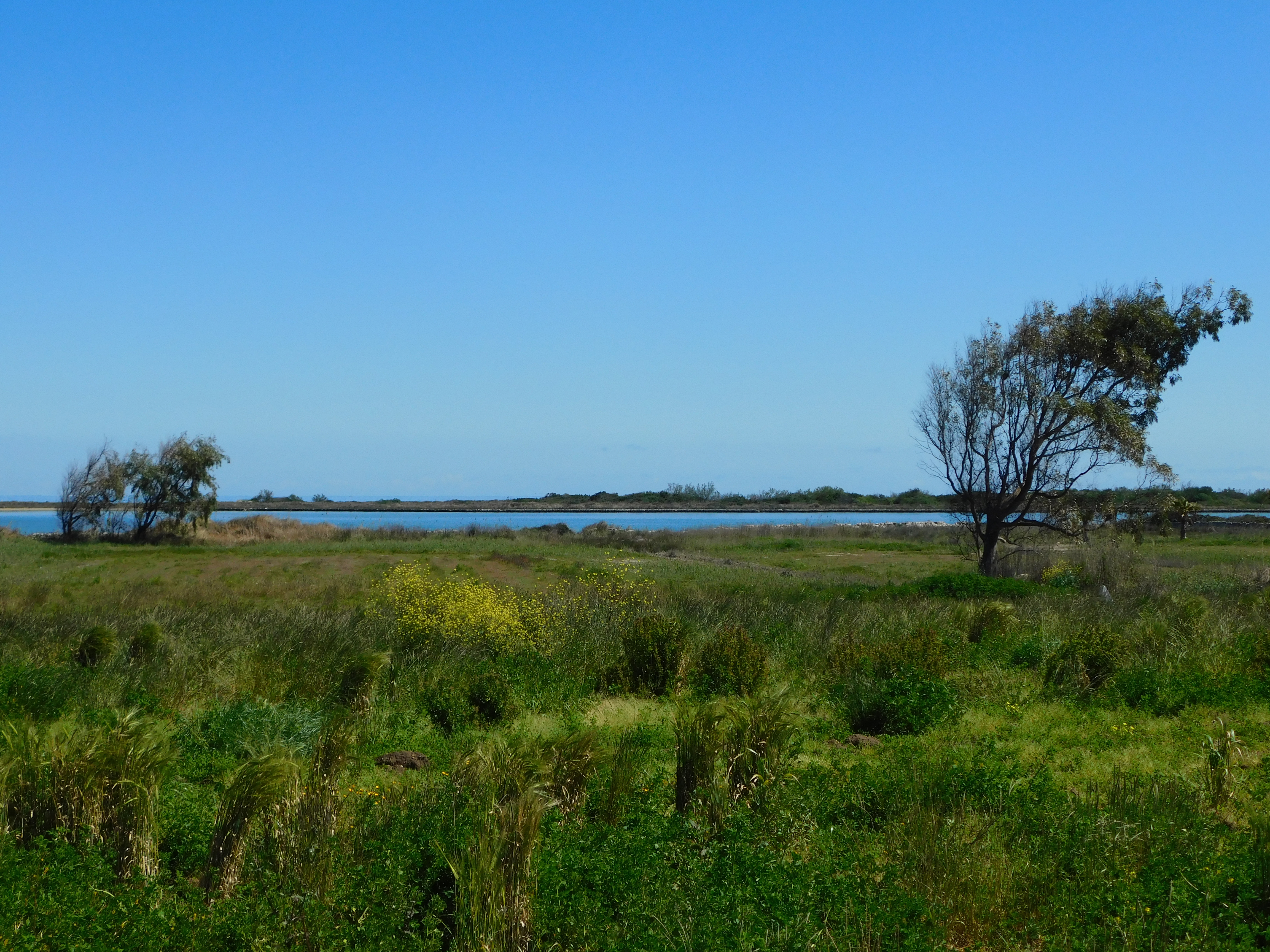 Il Bacino in primavera